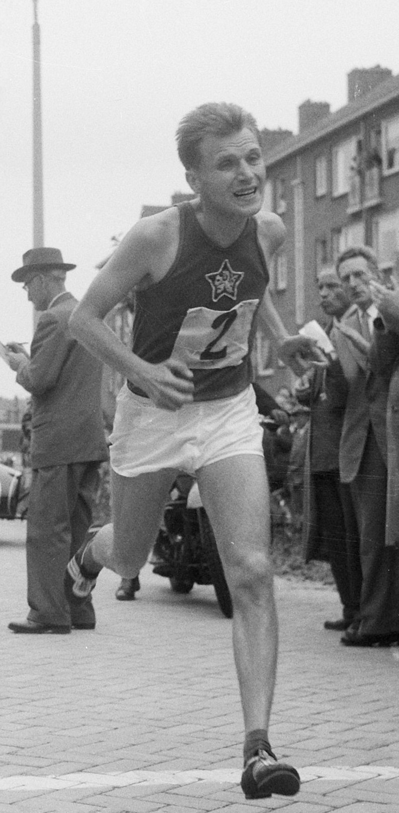 Nationale marathonkampioenschap in Zaandam, Kantorek